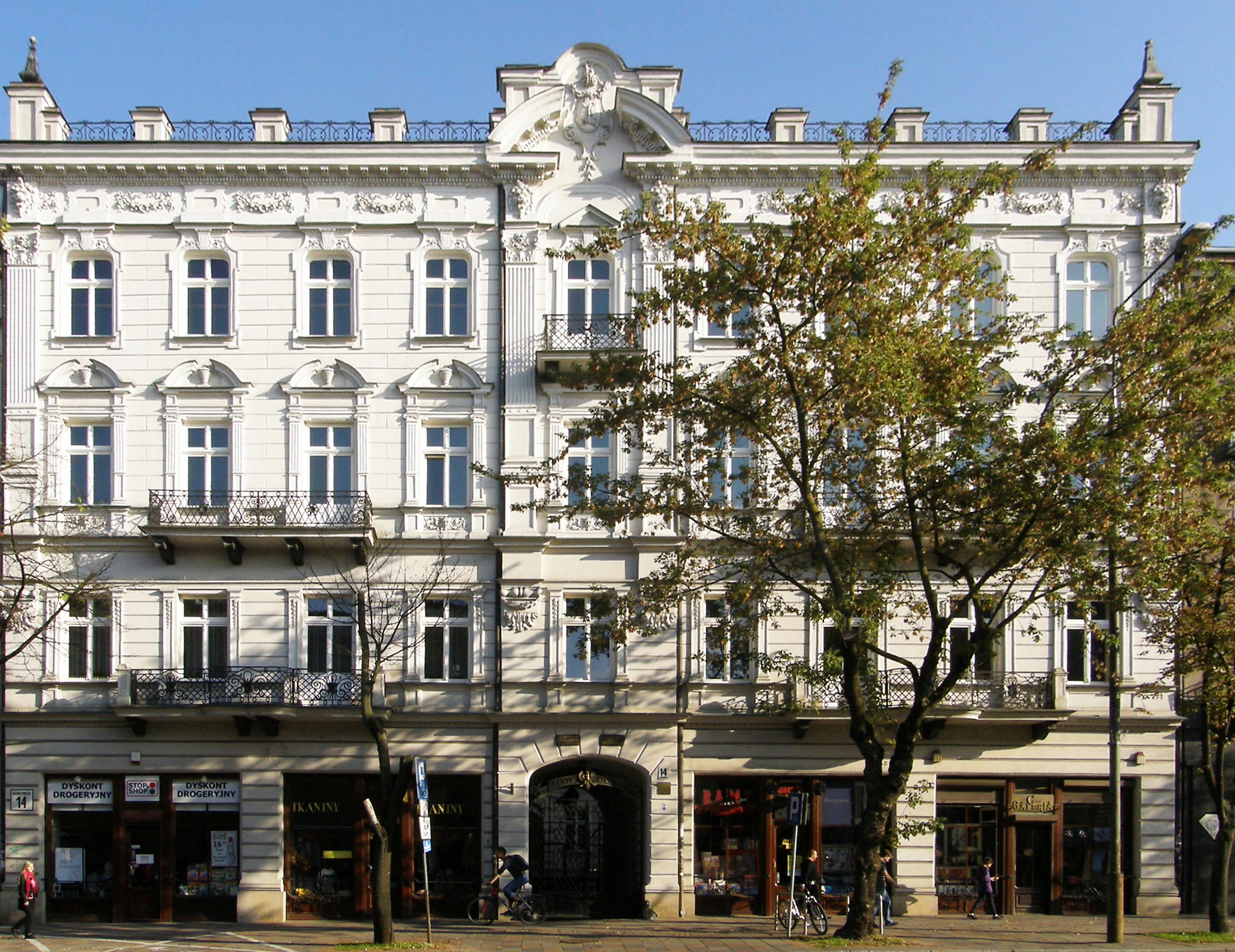 Białystok, ul. Sienkiewicza 14 - kamienica z oficynami (zabytek nr A-218 z 4.05.1982)